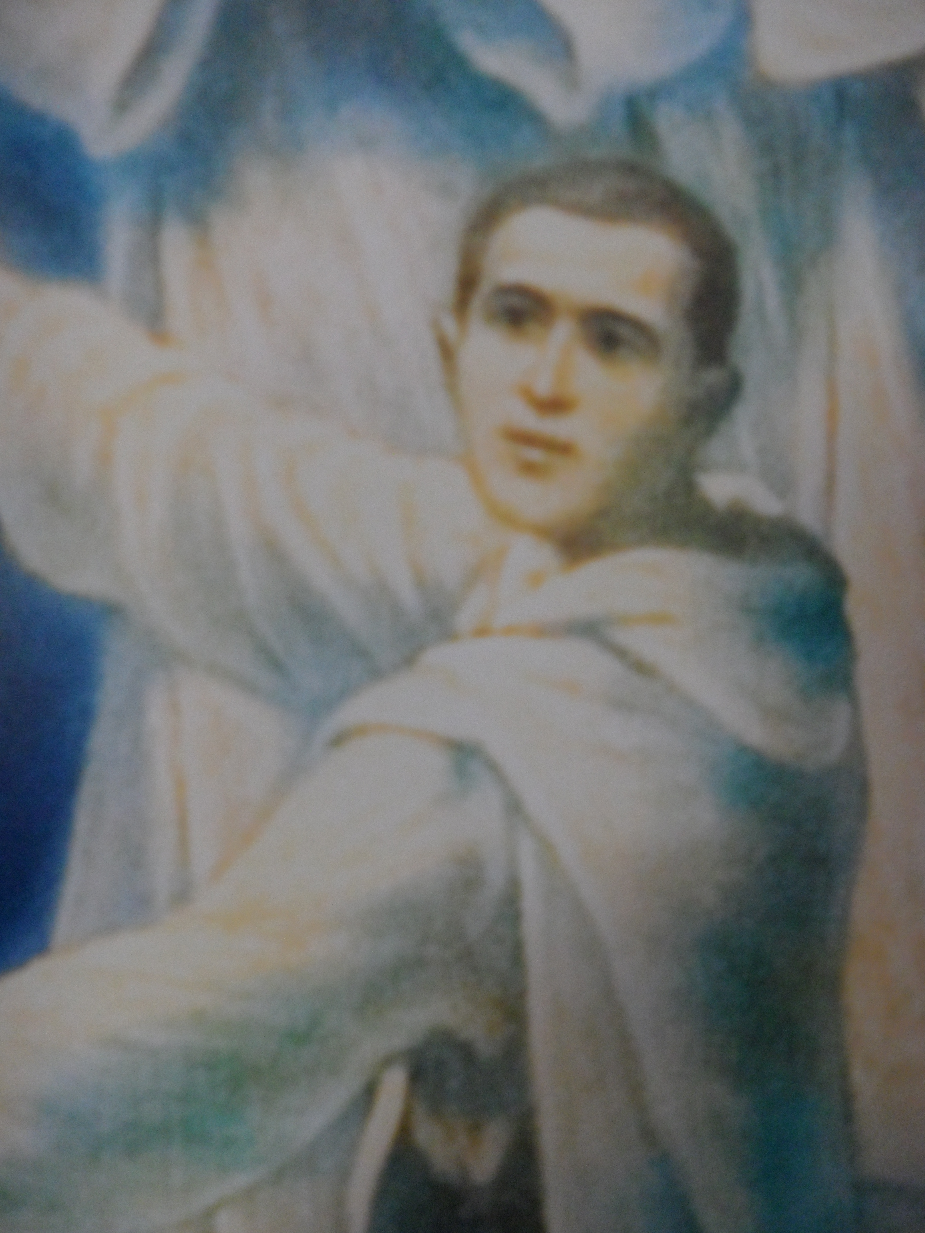 Particular del lienzo con motivo a la beatificación de Mariano de San José y compañeros mártires trinitarios. Convento de San Carlo alle Quattro Fontane.